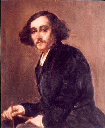 Jules Barbey d'Aurevilly (1808-1889) - musée de Saint-Sauveur-le-Vicomte